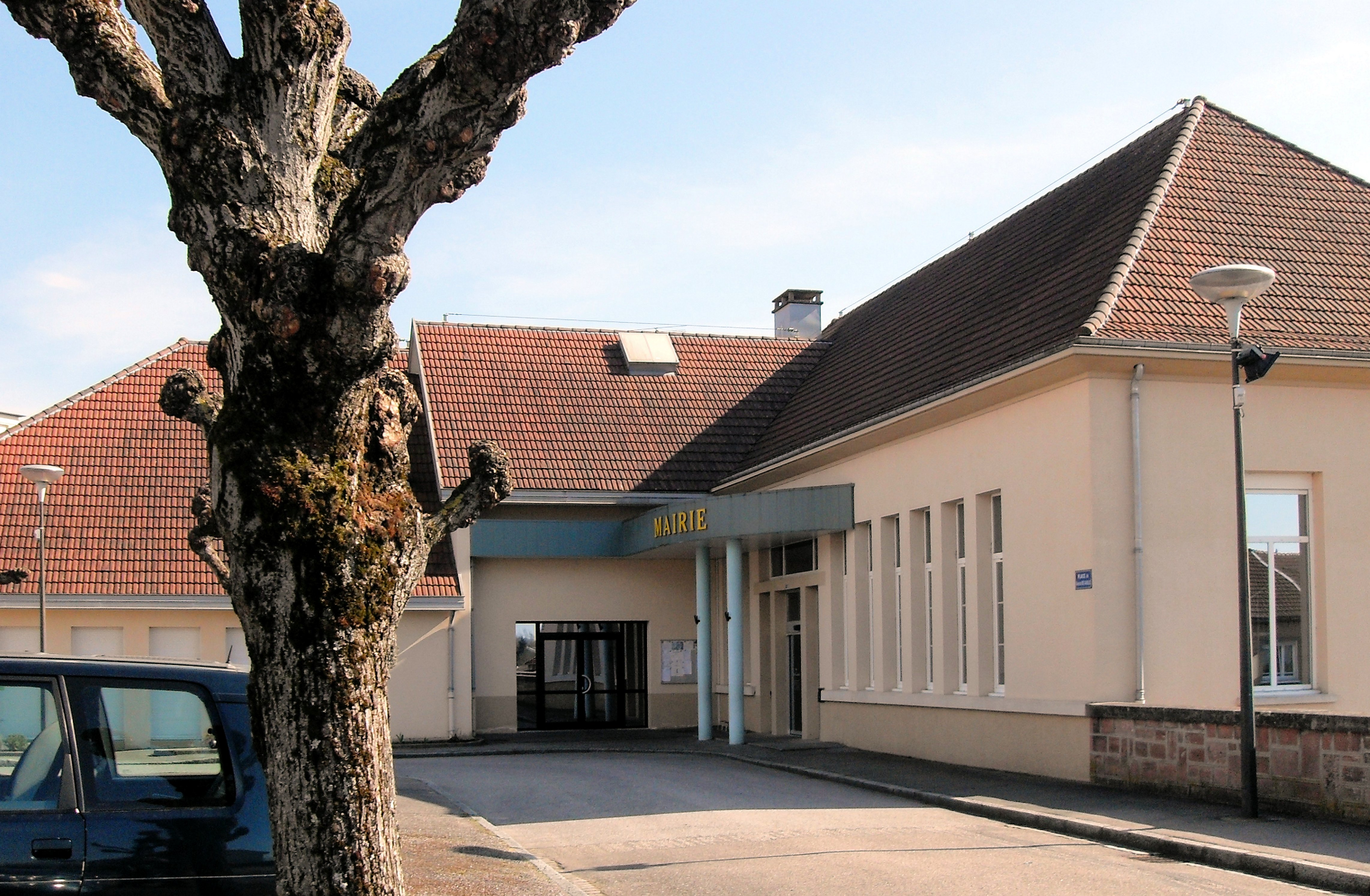 La mairie de Châtel-sur-Moselle